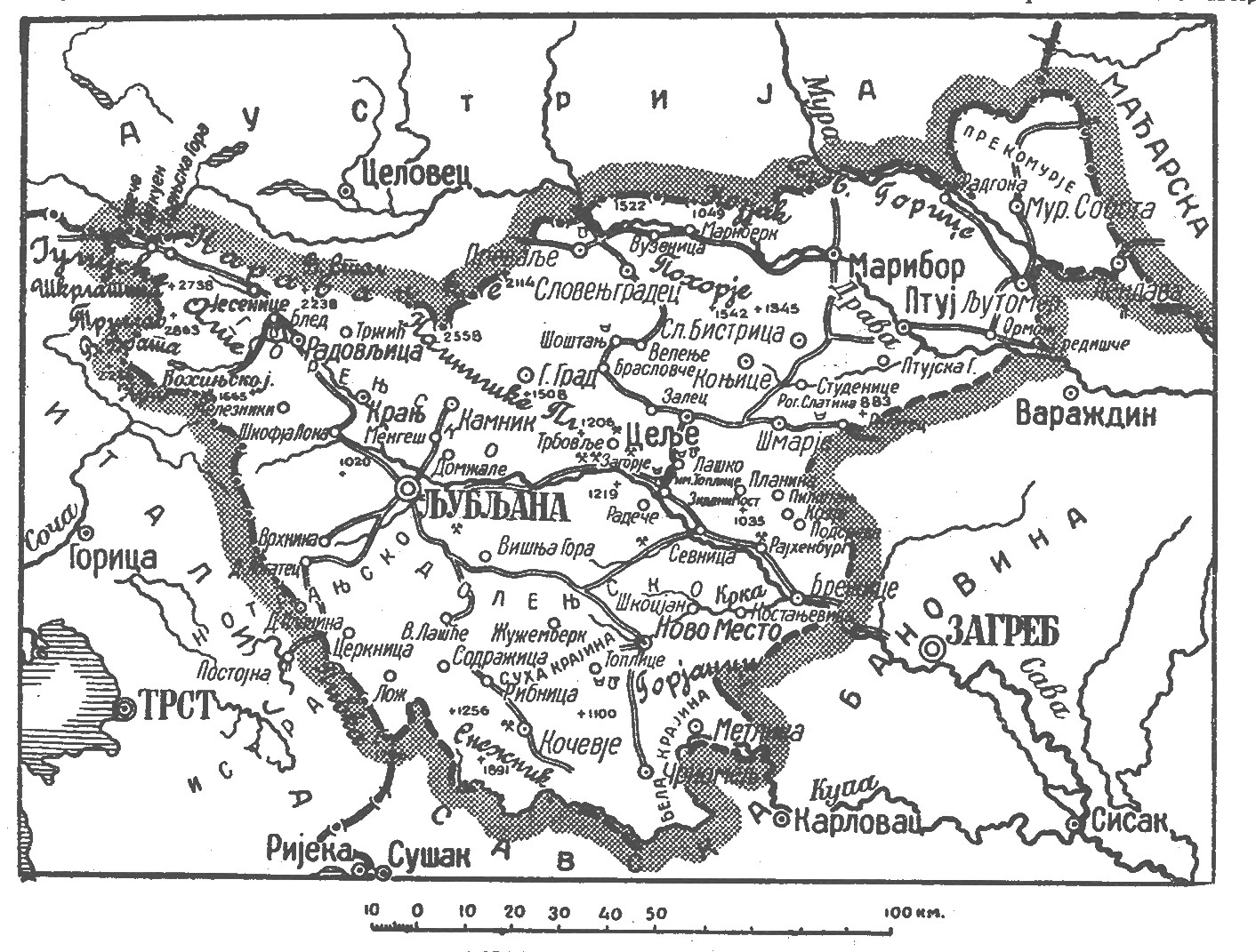 Карта Дравске бановине.